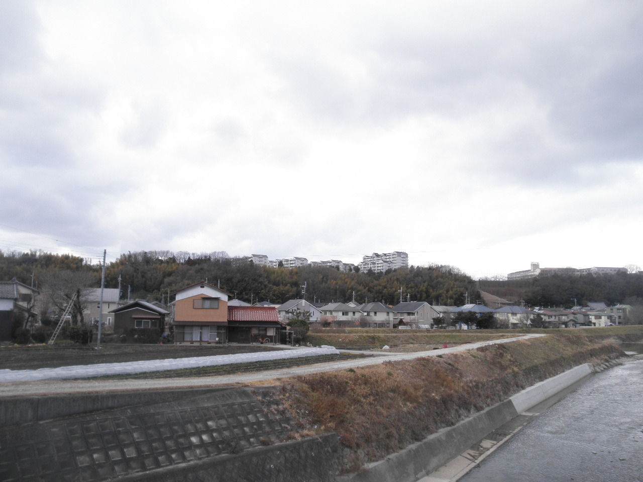 兵庫県神戸市北区道場町日下部